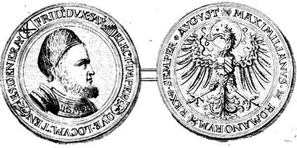 Schautaler Friedrichs des Weisen von Sachsen aus Koehlers Münzbelustigung. Kupferstich von 1730